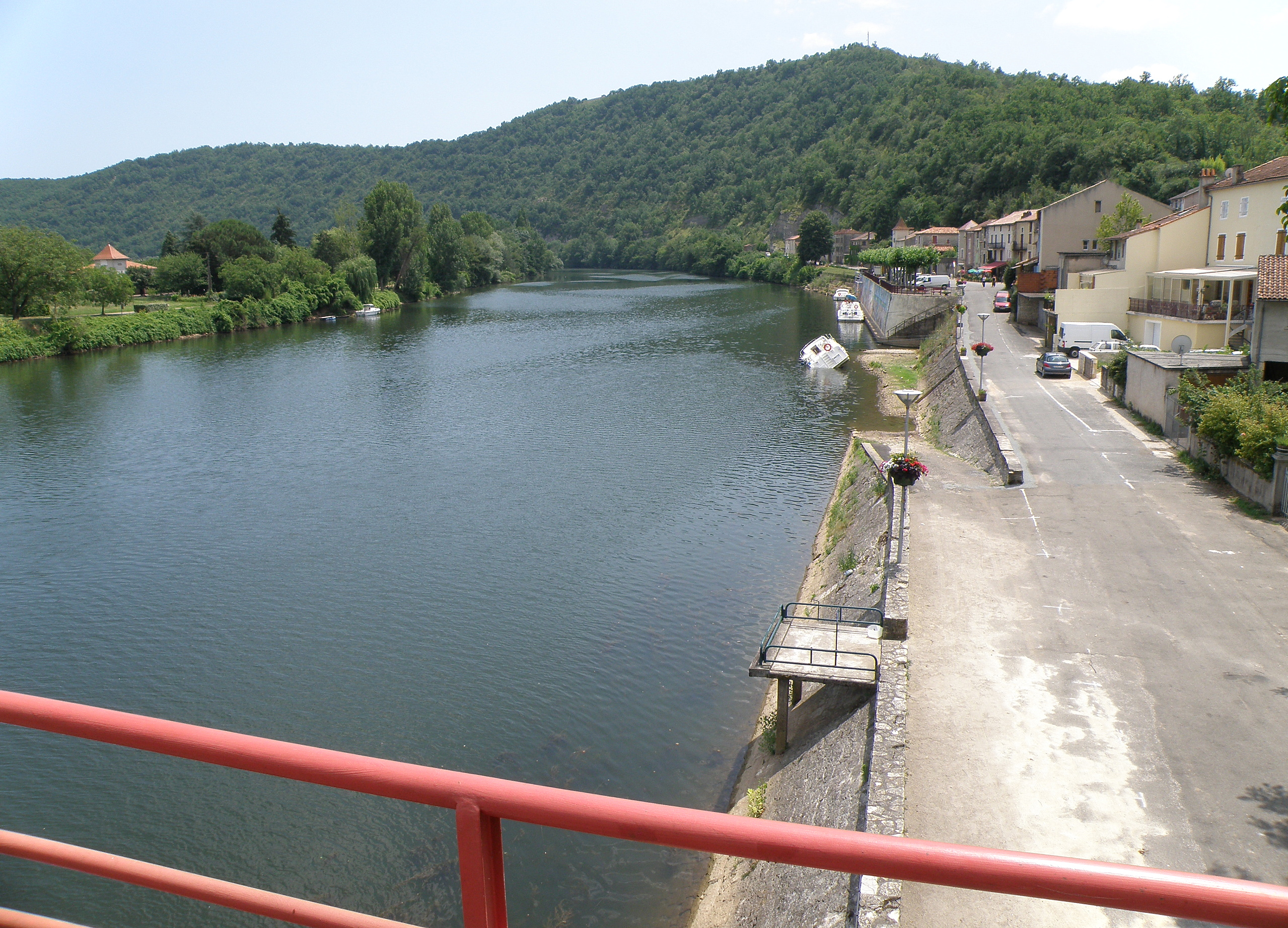 Douelle, commune et village situés sur la rive gauche du Lot, sept km environ (à vol d’oiseau) à l’ouest de Cahors, dans le département du Lot, France (région Midi-Pyrénées). La rivière Lot, avec plaisancier malheureux (juillet 2010), vue du pont suspendu. Maisons de Douelle à droite (rive gauche). À l'arrière-plan, cévenne de Douelle, creusée par le Lot ; à quelque distance à gauche du sommet (marqué par un pylône de télécommunication), on aperçoit l'aire de lancement de parapente. Regard tourné vers le sud-est.